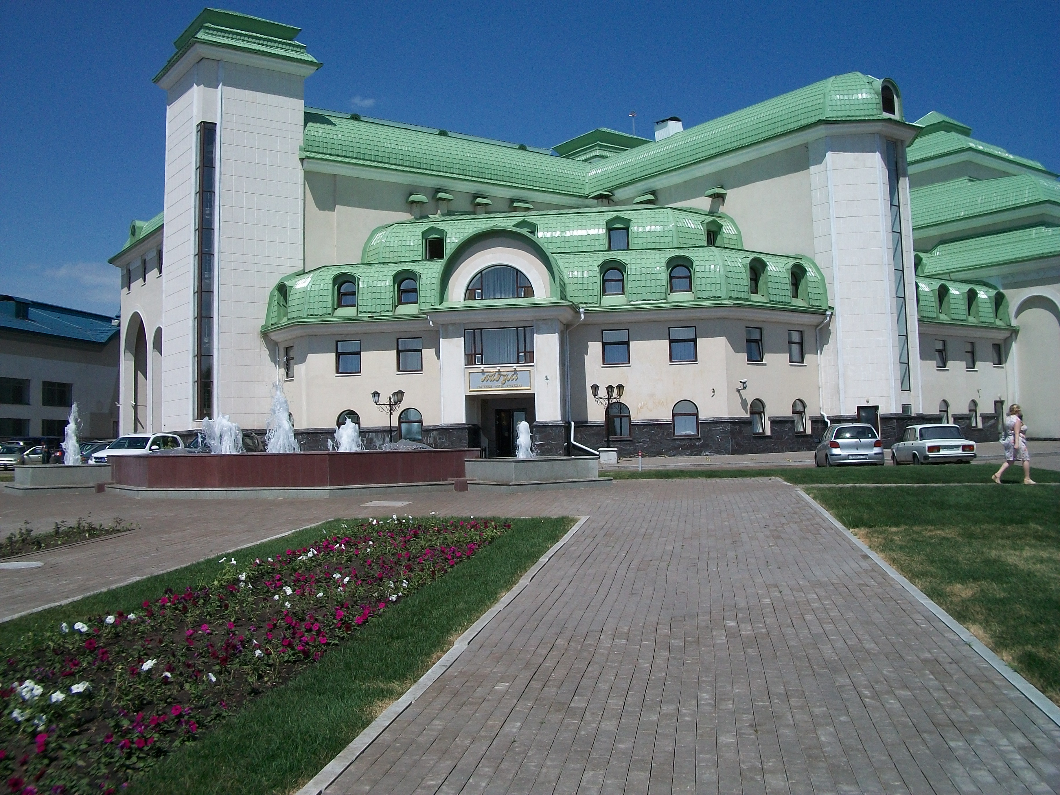 Здание башкирского академического театра драмы им. М.Г. Гафури (Республика Башкортостан, Уфа, улица Фрунзе, 28)